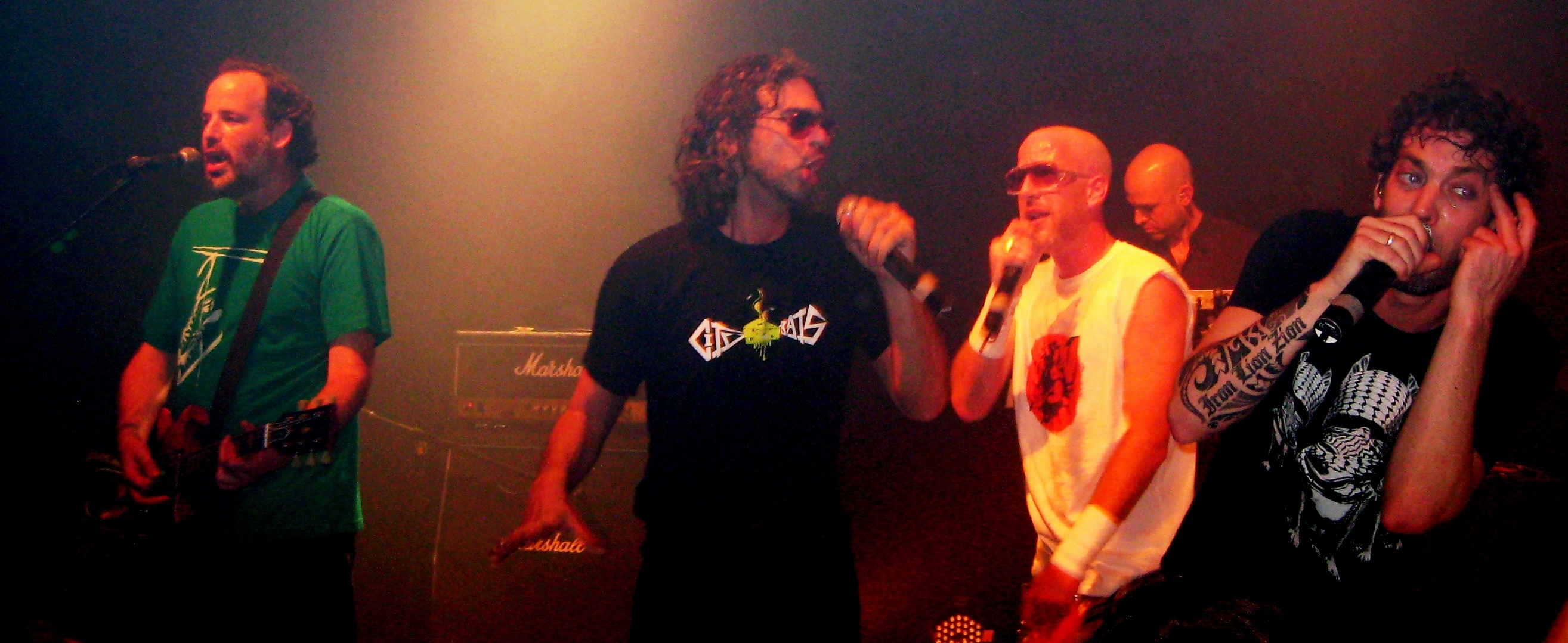 הופעה של שב"ק ס' במועדון הבארוק בבאר-שבע